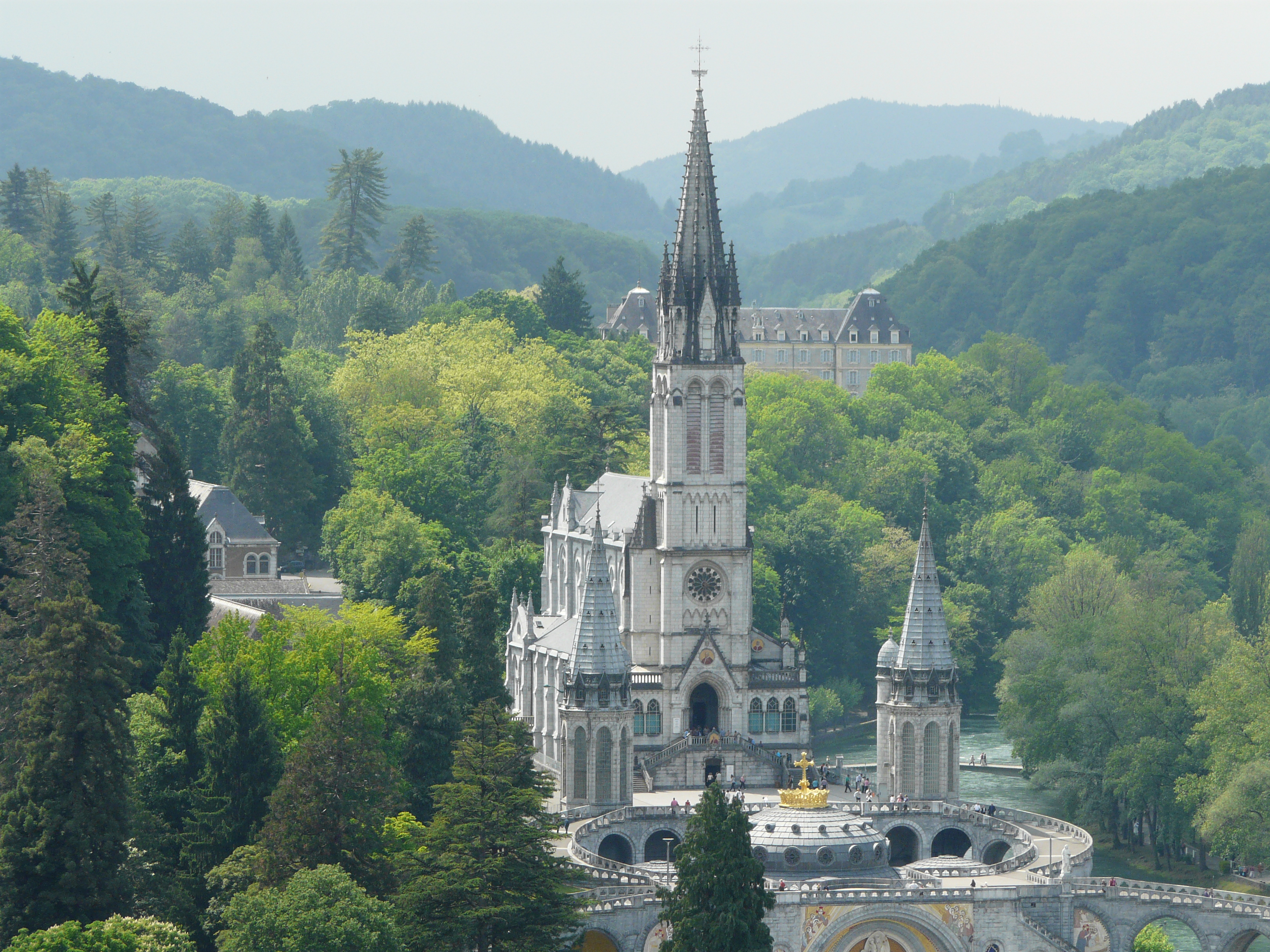 La basilique de l'Immaculée-Conception, Lourdes, Hautes-Pyrénées, France.